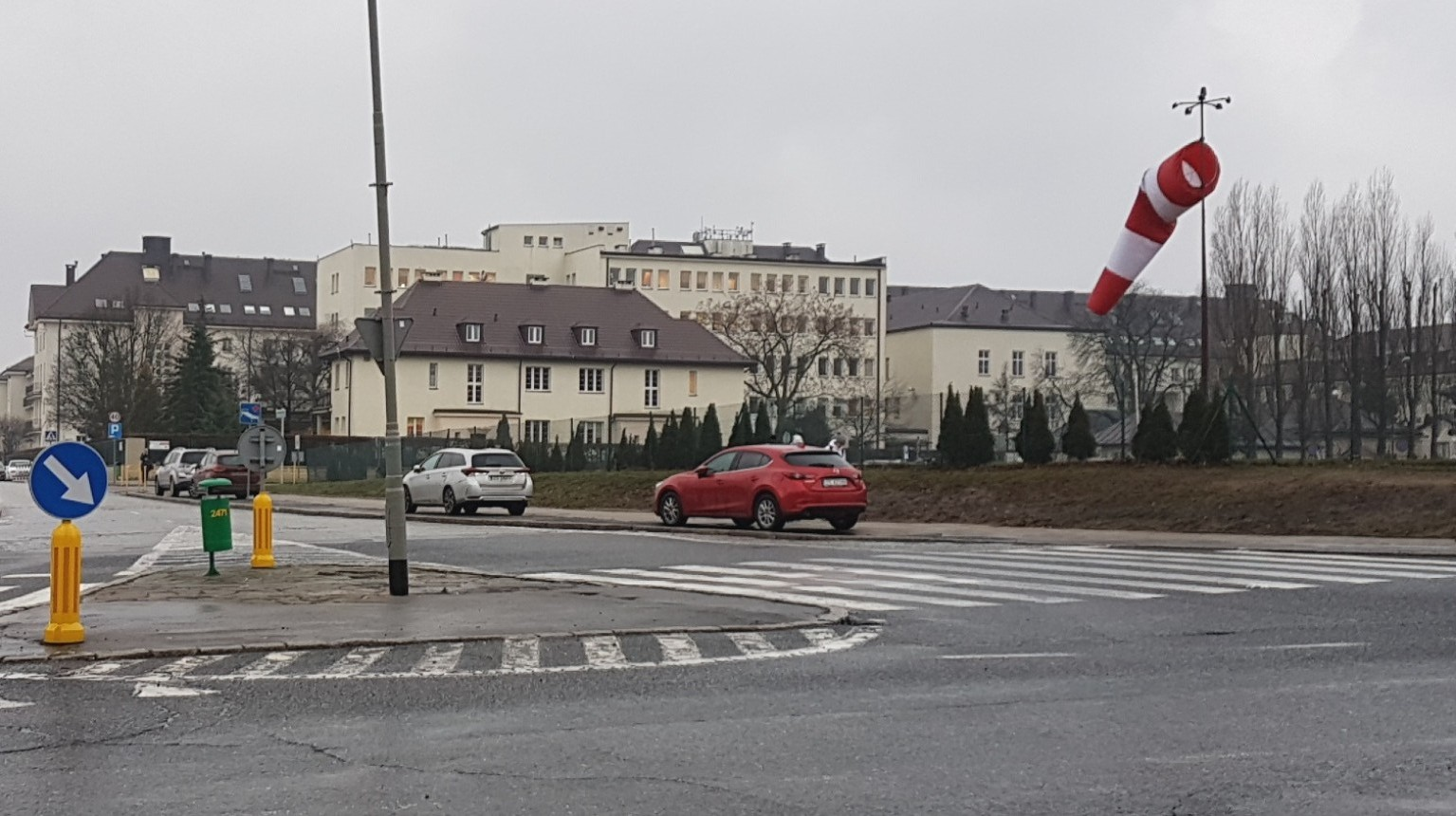 Samodzielny Publiczny Szpital Kliniczny Nr 1 PUM